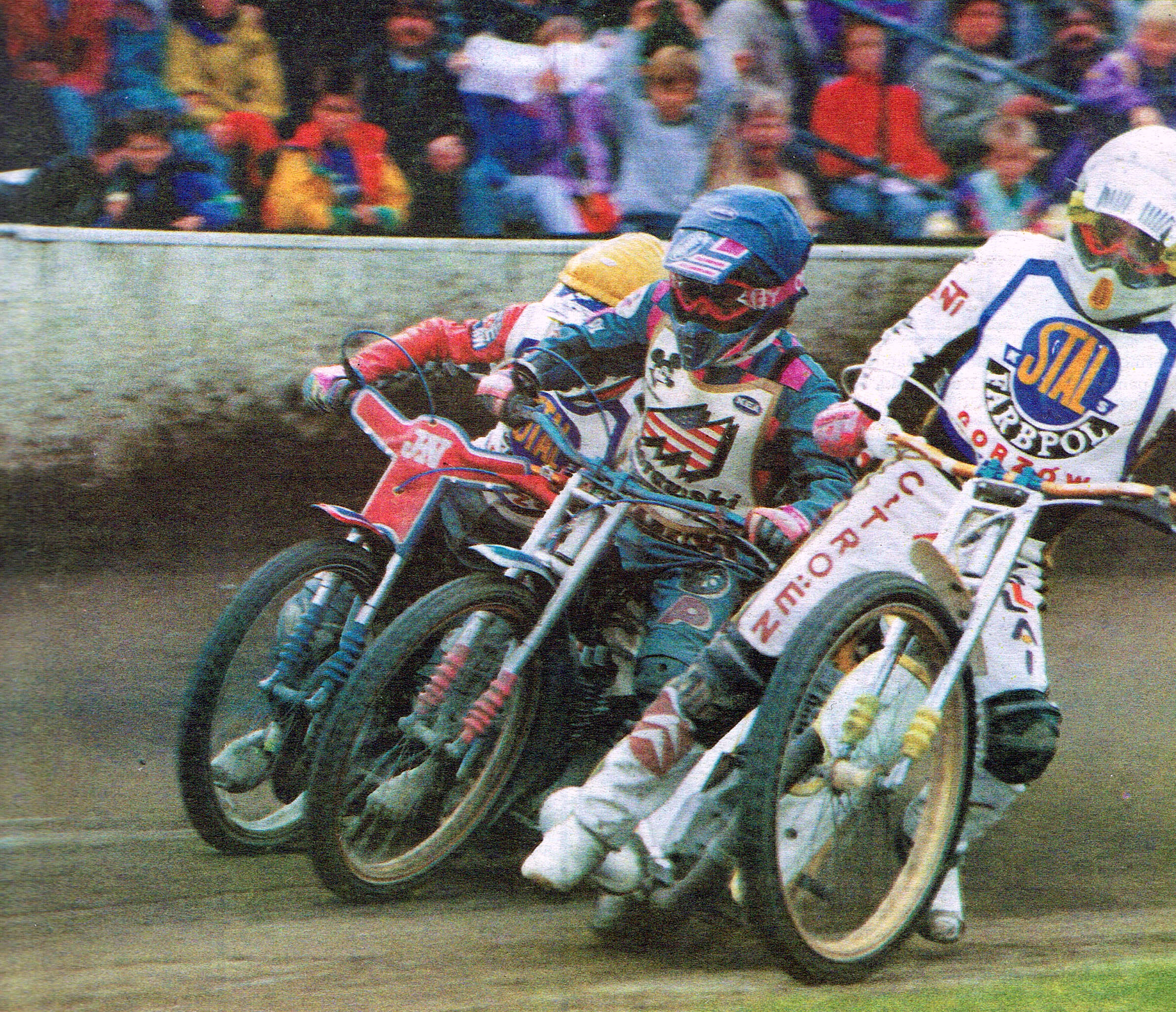 Jarosław Szymkowiak